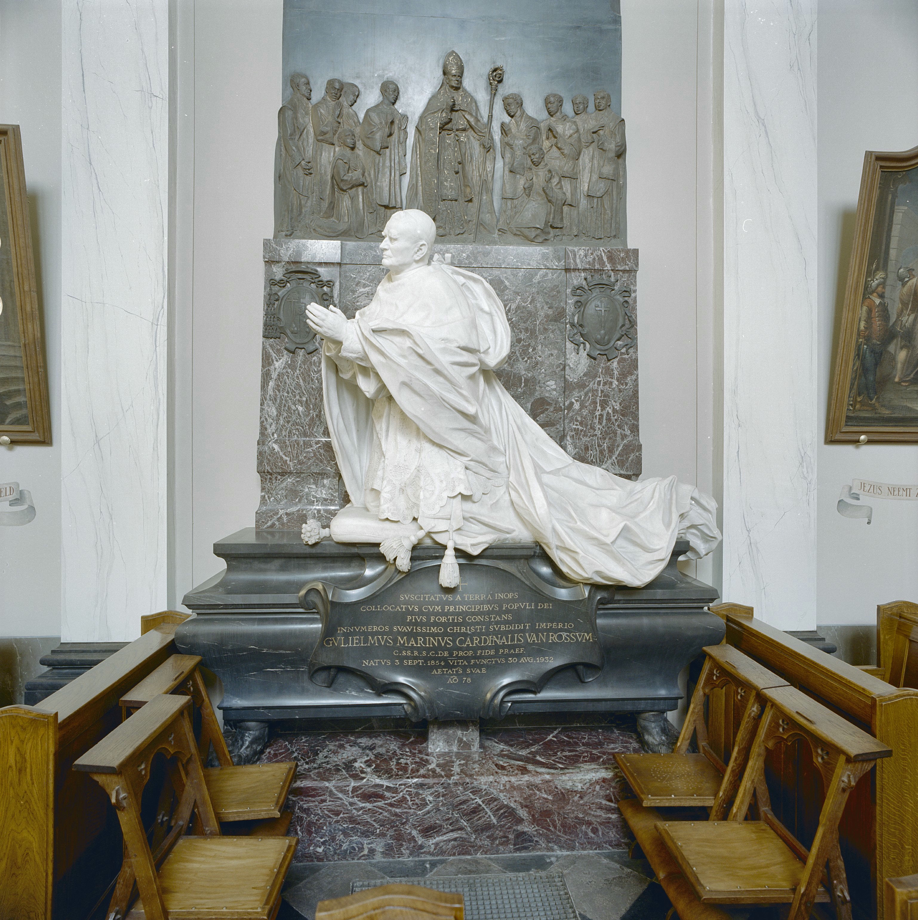 Redemptoristenklooster: Interieur kapel, beeld kardinaal van Rossum